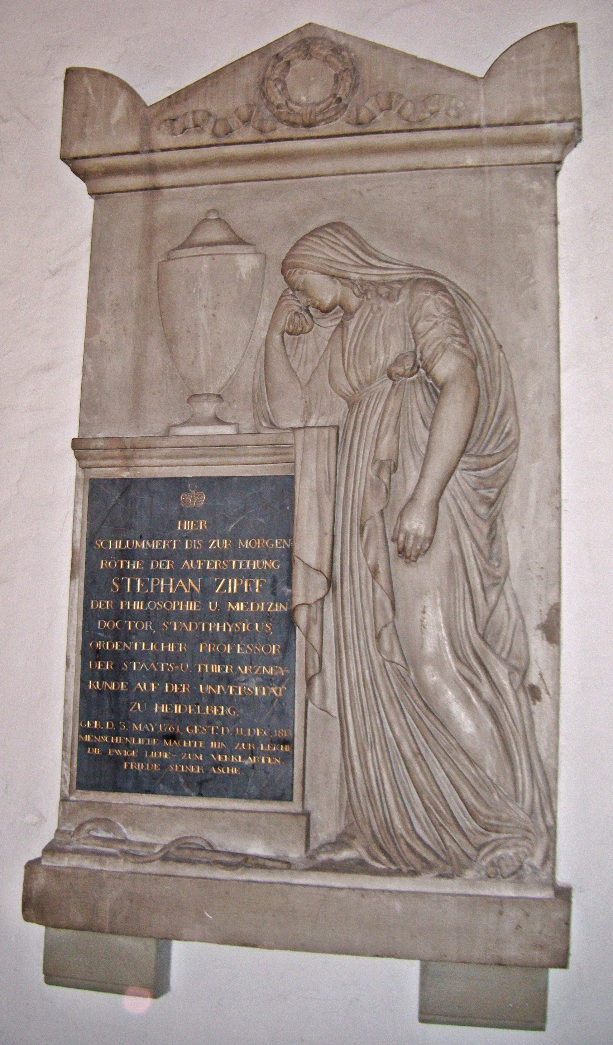 Epitaph des Medizinprofessors an der Universität Heidelberg, Stephan Zipff (1761-1813), Chor der Heiliggeistkirche Heidelberg